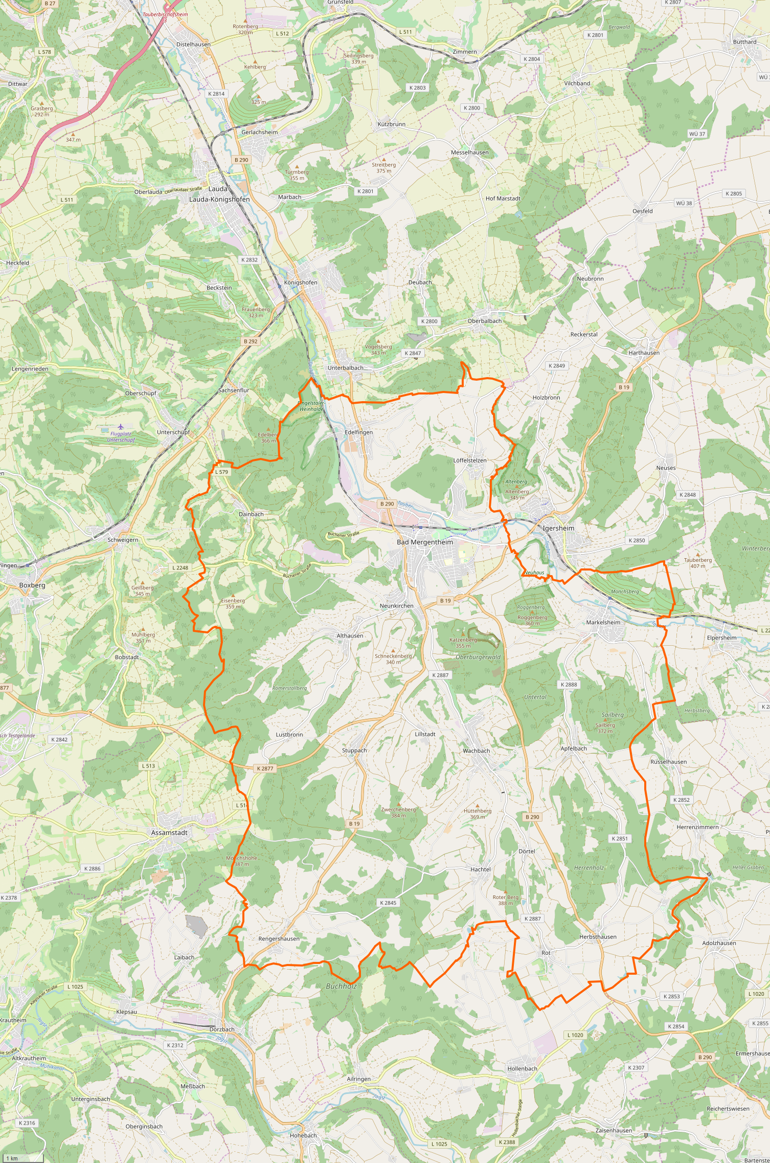 Gemarkung und Lage der Stadt Bad Mergentheim. Siehe auch: Liste der Kulturdenkmale in Bad Mergentheim. Gemarkungen und Lagen der Städte und sonstigen Gemeinden im Main-Tauber-Kreis: Ahorn · Assamstadt · Bad Mergentheim · Boxberg · Creglingen · Freudenberg · Großrinderfeld · Grünsfeld · Igersheim · Königheim · Külsheim · Lauda-Königshofen · Niederstetten · Tauberbischofsheim · Weikersheim · Werbach · Wertheim · Wittighausen